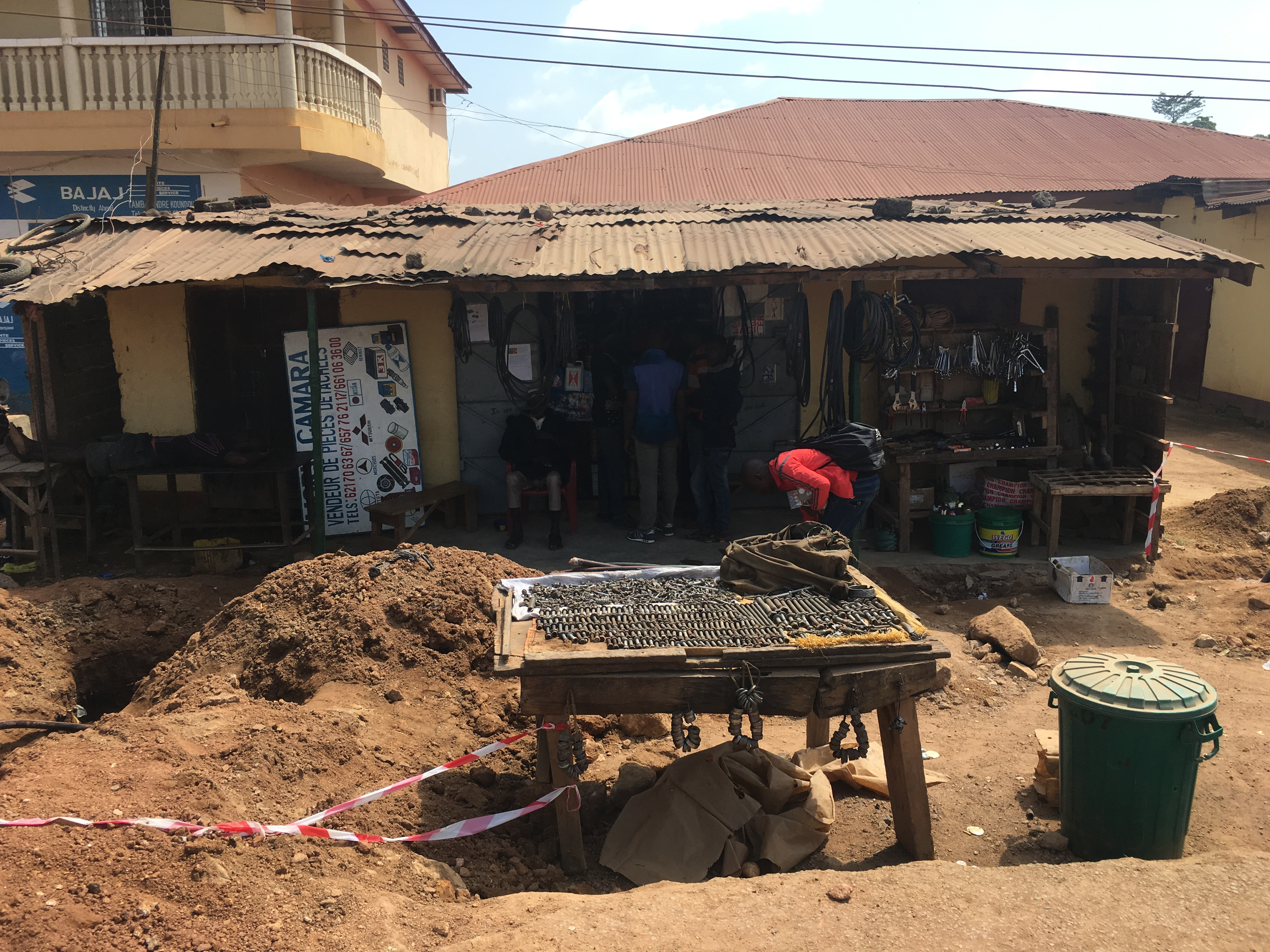 Marktstand mit einzelnen Schrauben an der Hauptstrasse